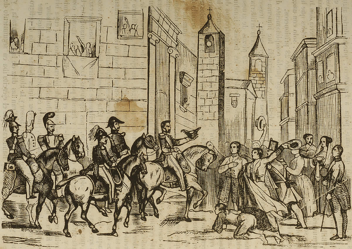 Entrada de Baldomero Espartero en Bilbao tras el sitio de la Villa en 1836.